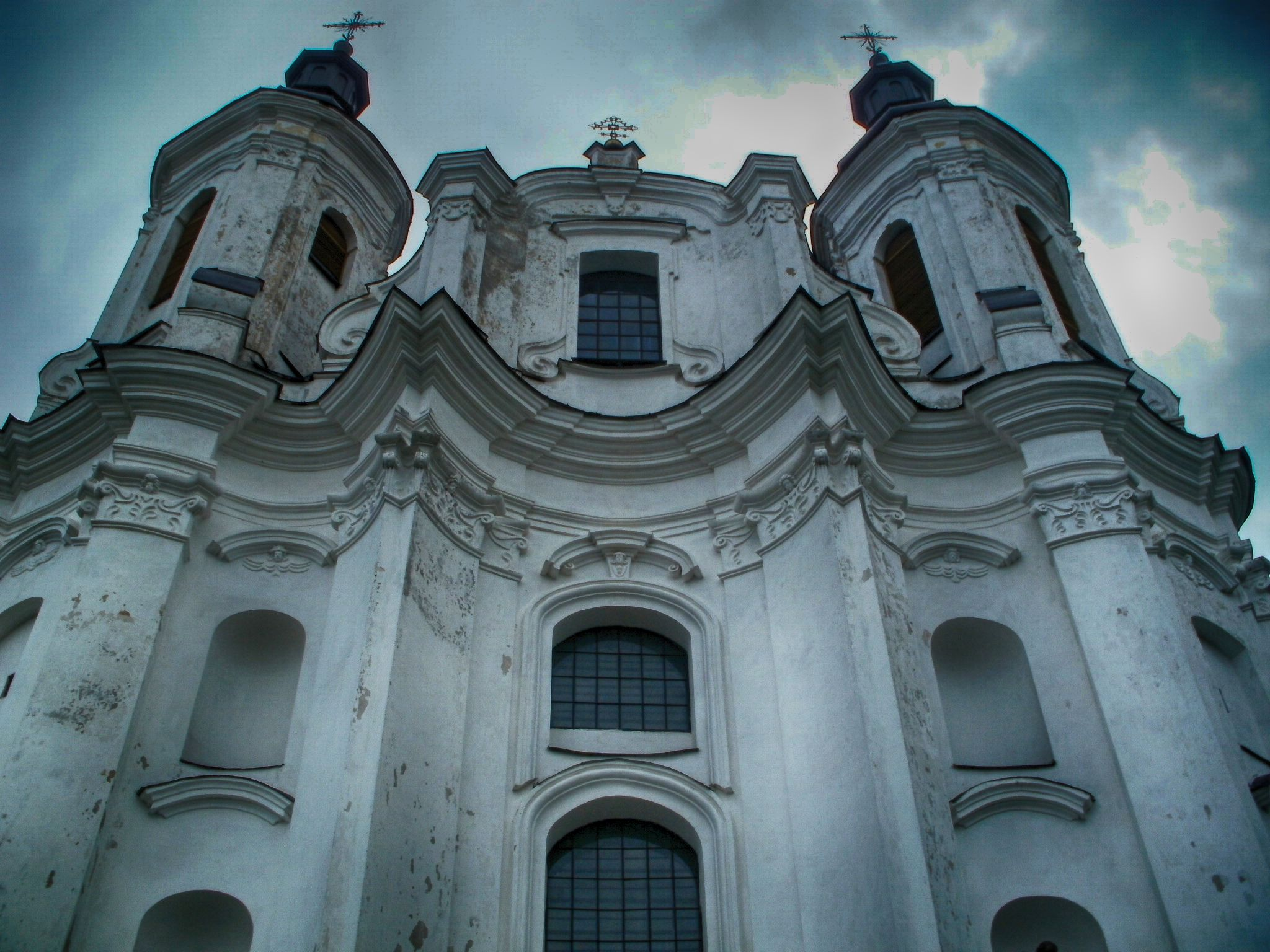 Беларуская (тарашкевіца): Ансамбаль Андрэеўскага касьцёлу: касьцёл жылы корпус брама з агароджай. г. Слонім This is a photo of Belarusian heritage monument. Reference number: 412Г000498 ( WLM)